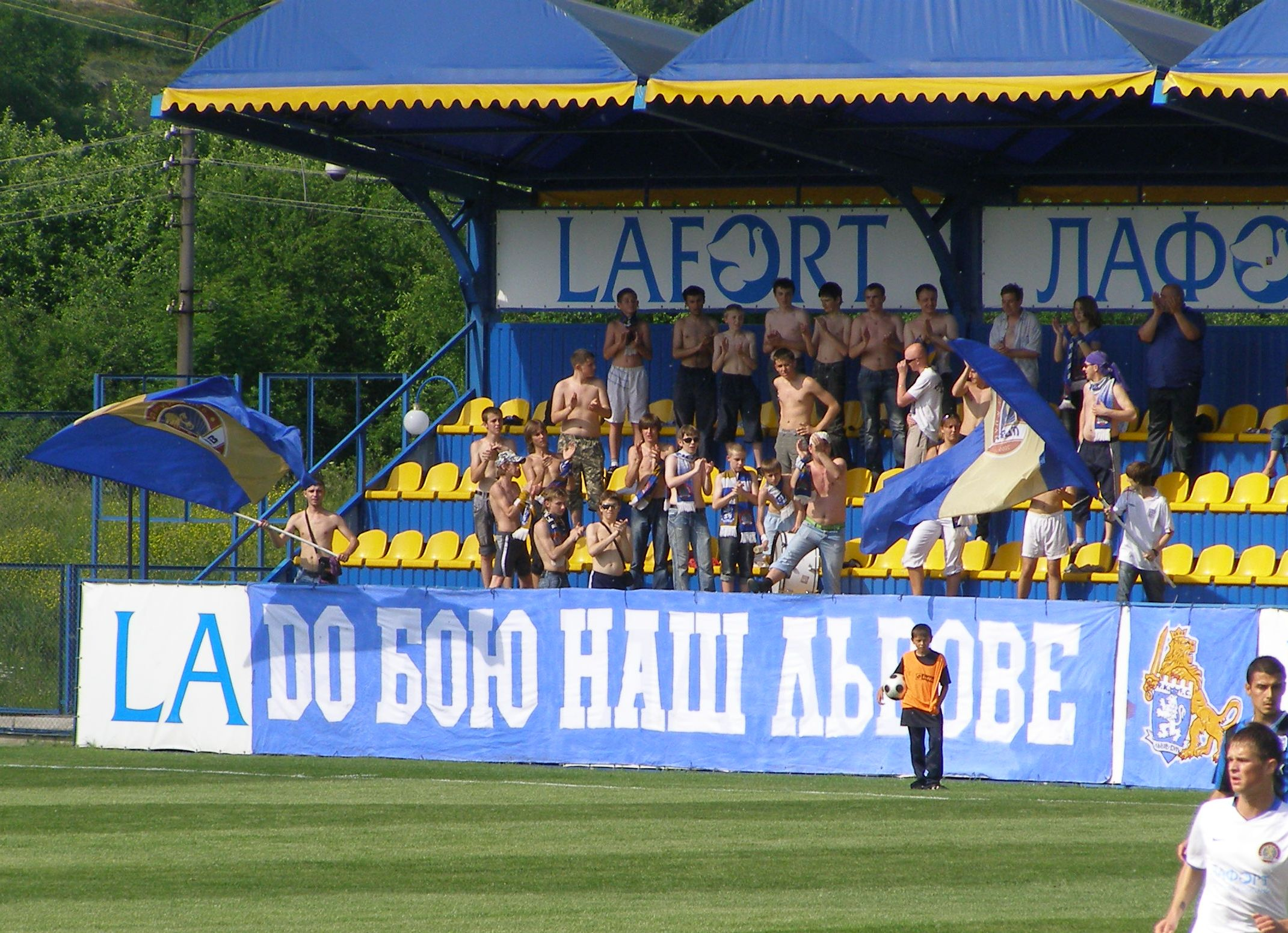 Anhänger von FC Lwiw in Lafort Arena (Dobromyl)